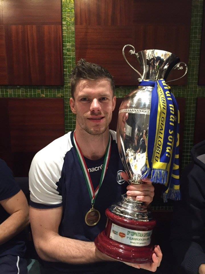 Pieter Verhees met de Italiaanse beker in de hand.